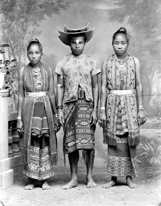 Repronegatief. Een portret van een Roti man met zijn vrouwen in vol ornaat